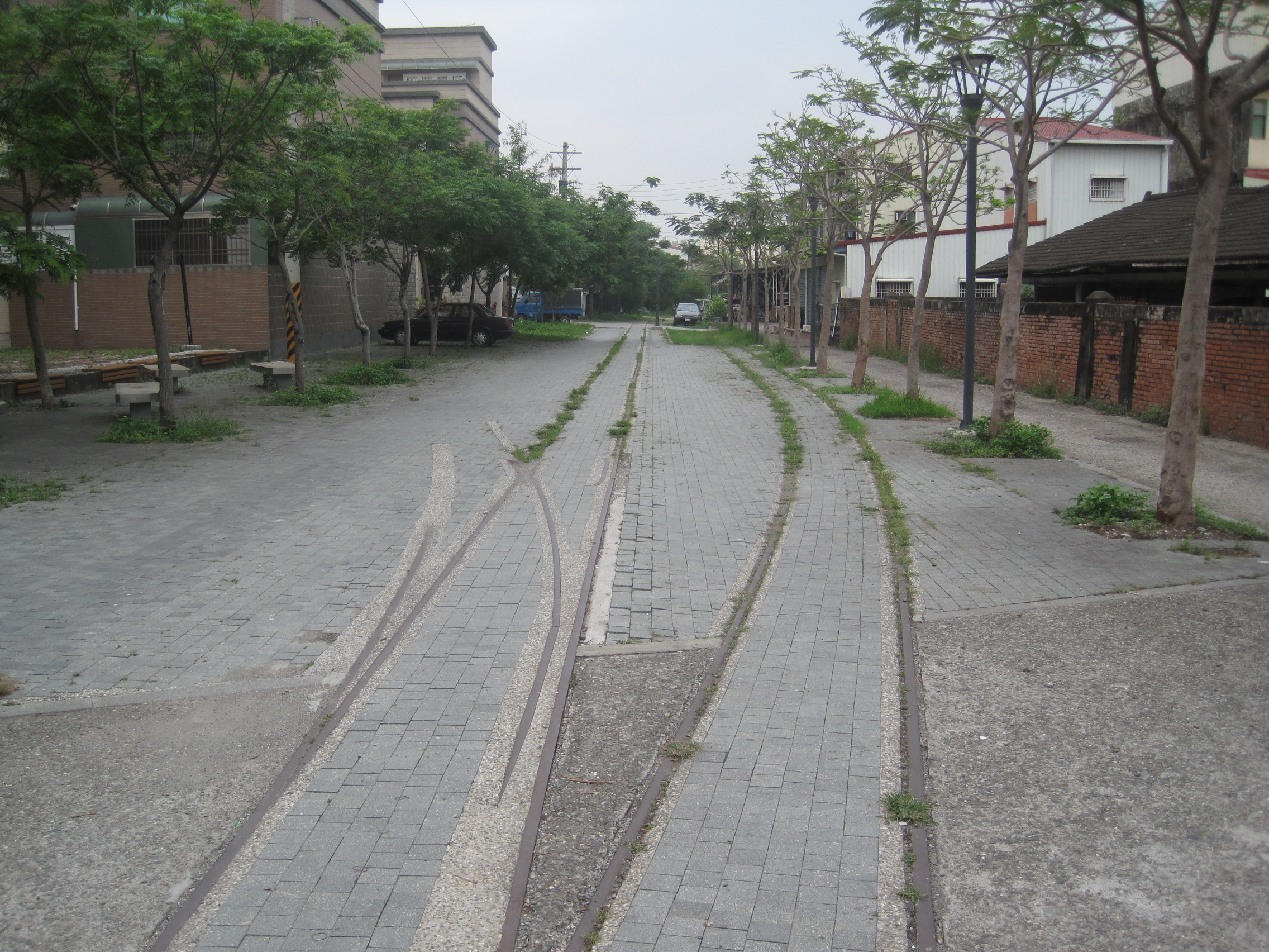 烏樹林線東山站附近的鐵軌